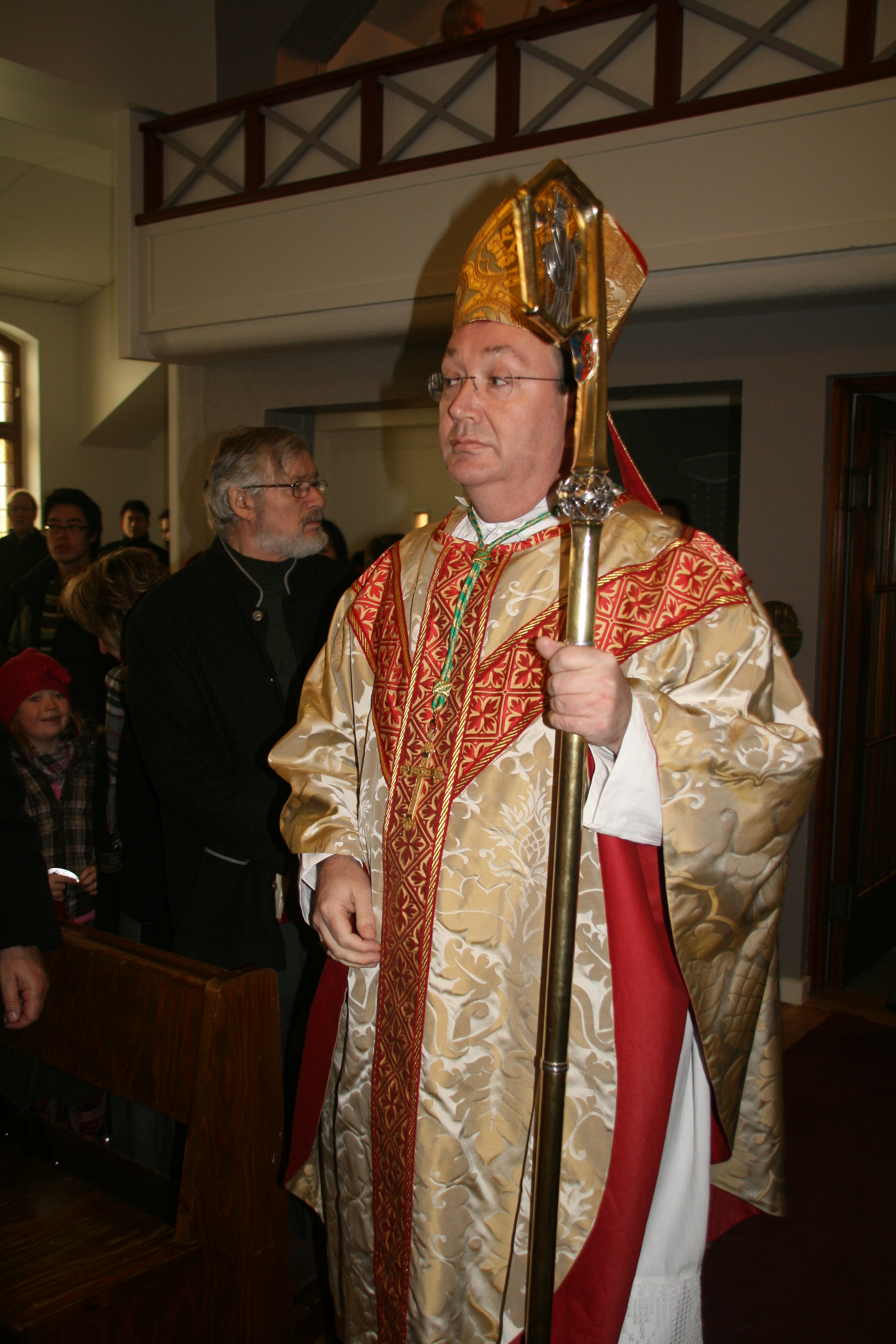 Katolsk biskop Bernt Ivar Eidsvig i Arendal ved vigslingen av St. Franciskus Xaverius kirke